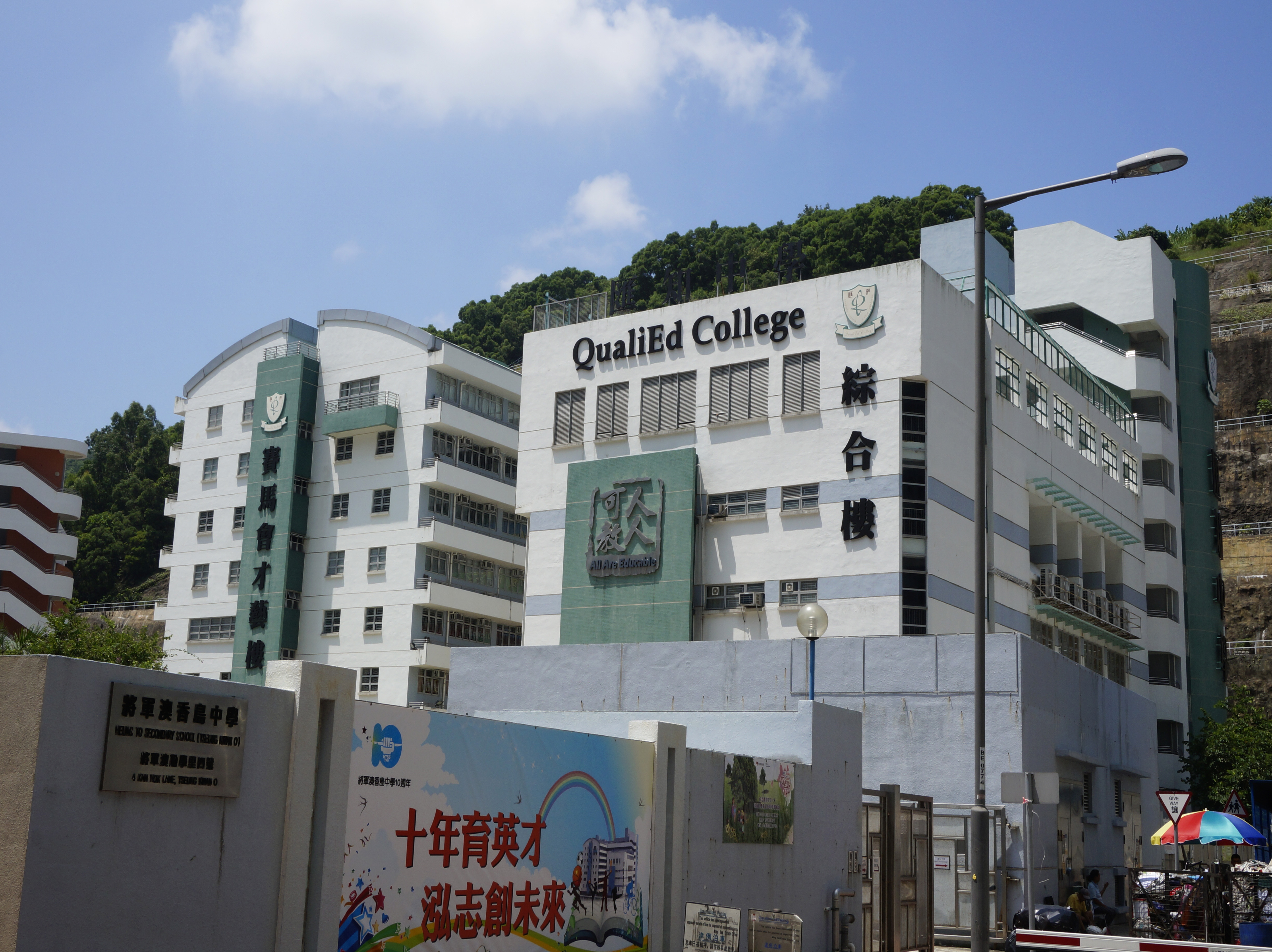 匯知中學綜合樓